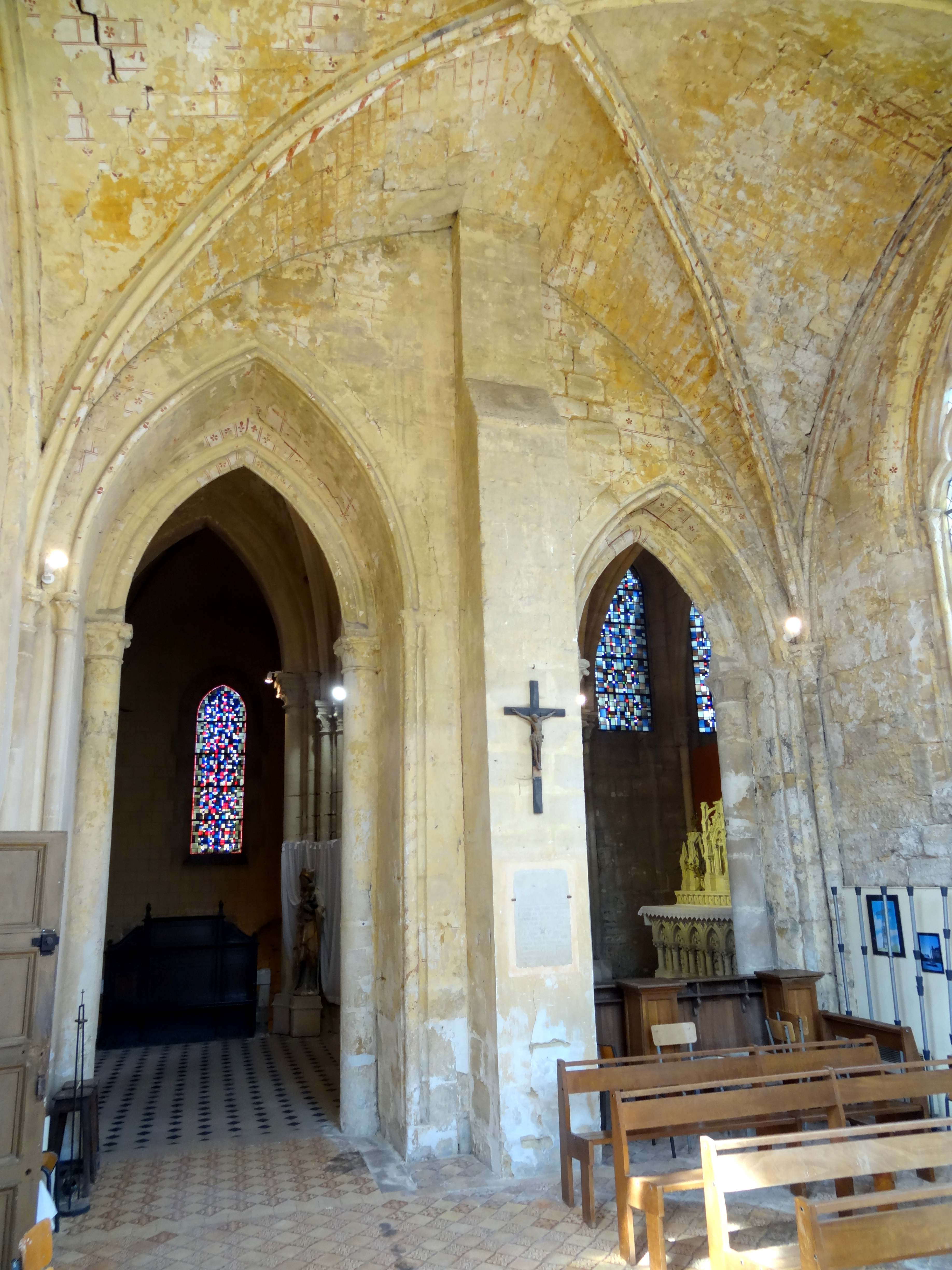 Intérieur de l'église - voir titre.